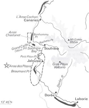 Mapa del suroeste de la Isla de Santa Lucía, tomado del NOAA (dominio público)